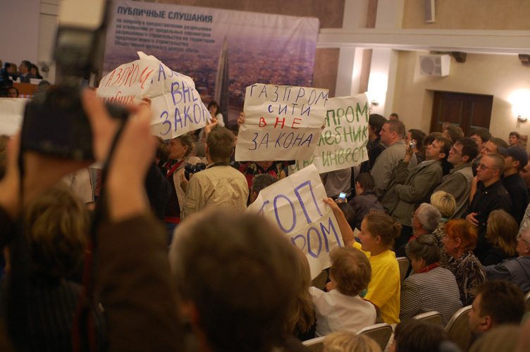 Люди